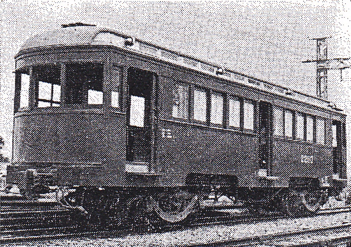 名鉄ク2260形電車。旧・名古屋鉄道1500形として1923年新製。名鉄竹鼻線笠松駅にて撮影。